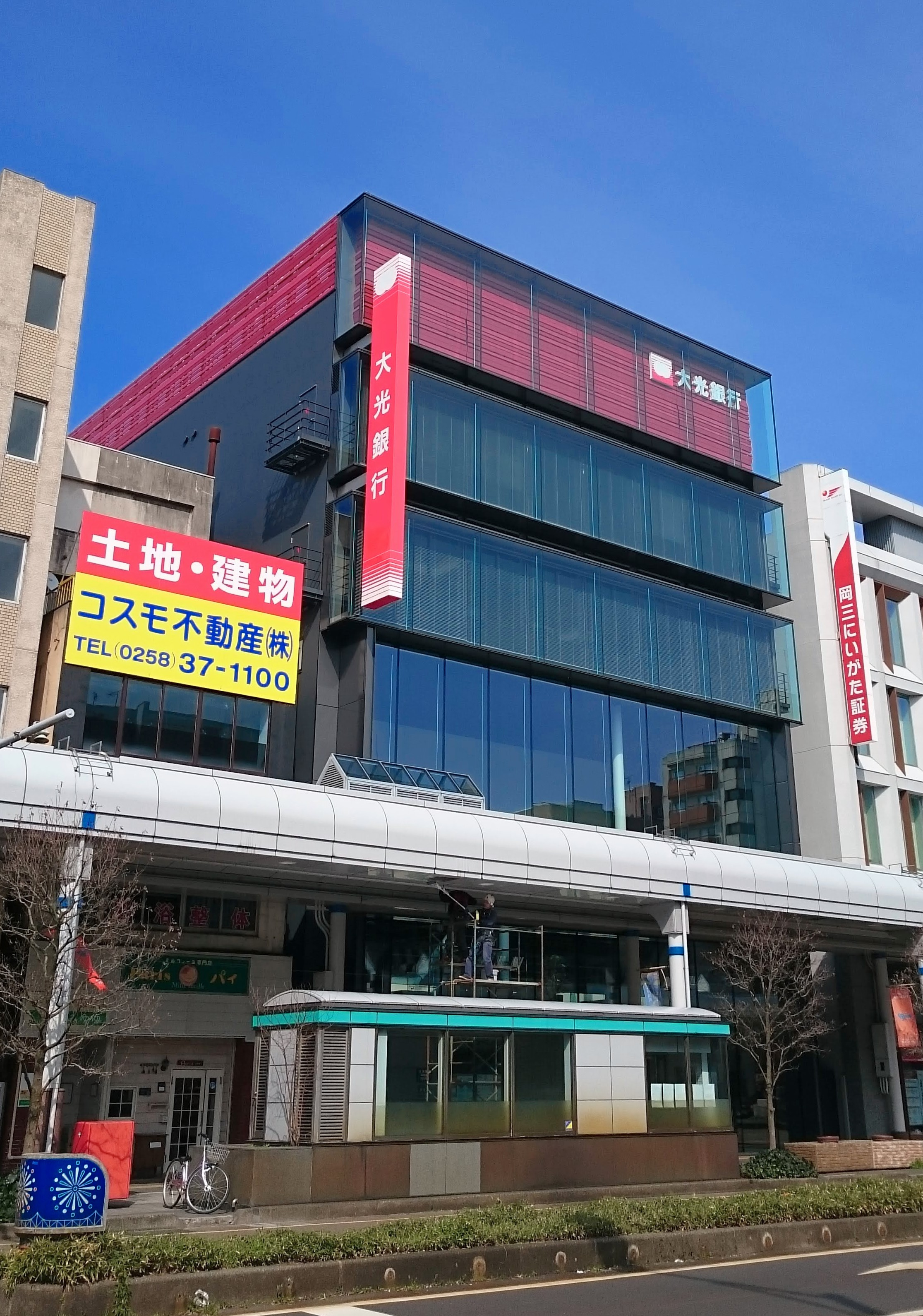 大光銀行 看板設置後